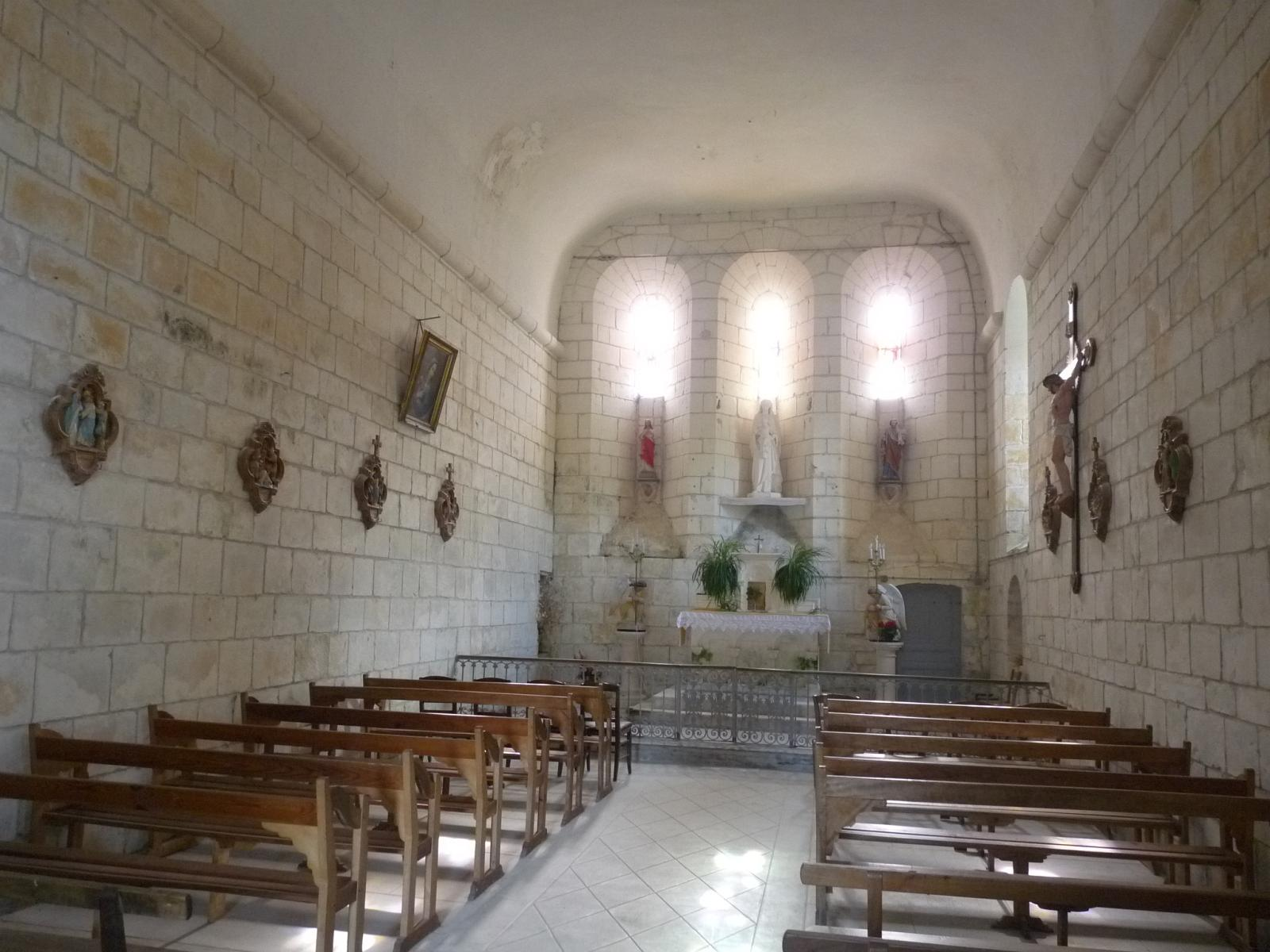 Chapelle des Templiers d'Angles, Salles-d'Angles, Charente, France